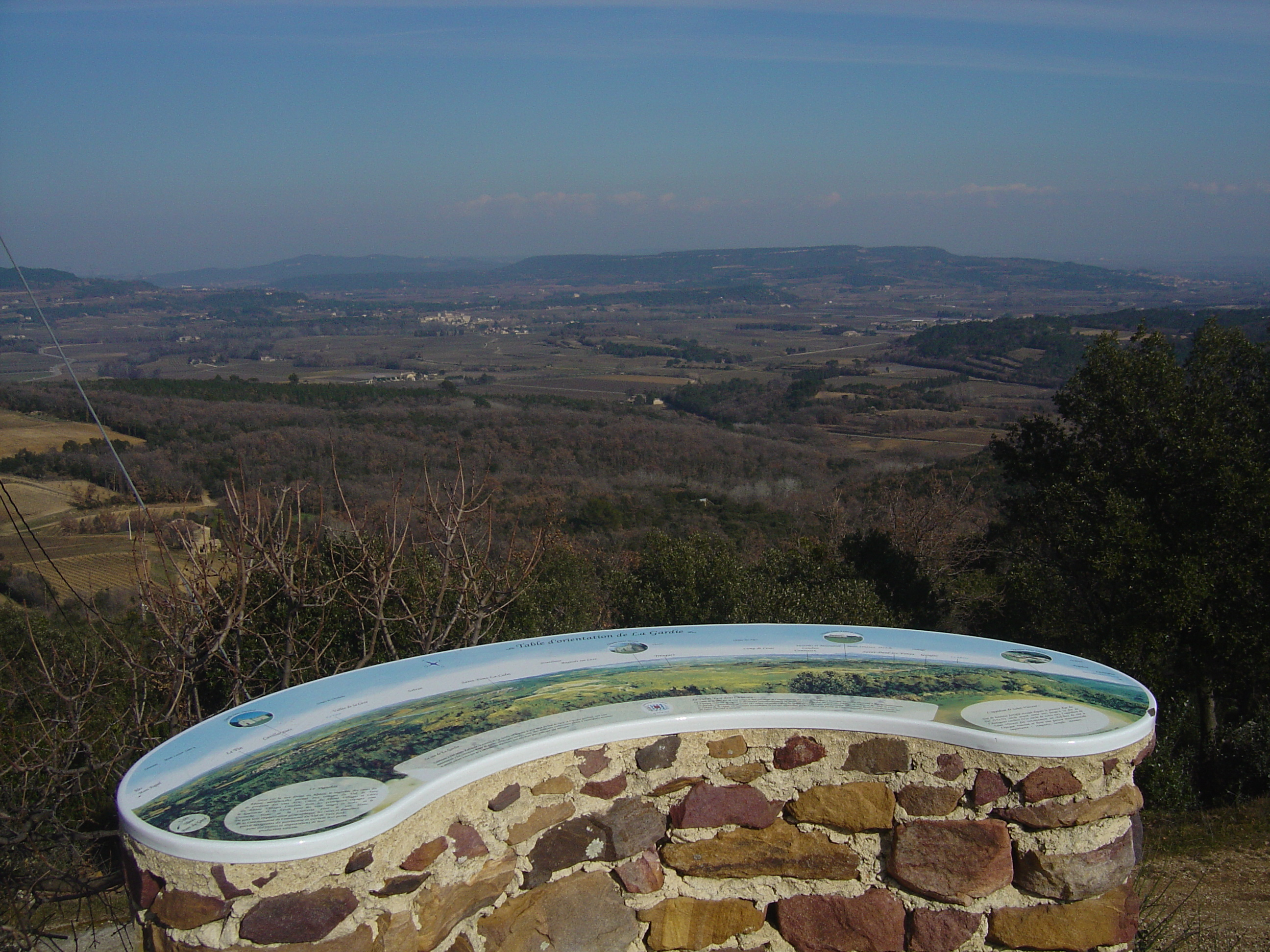 Table d'orientation du belvédère de la Gardie (288m) dans le Gard (30). On y voit notamment Tresques, et le plateau de la Dent de Signac et du Camp de César